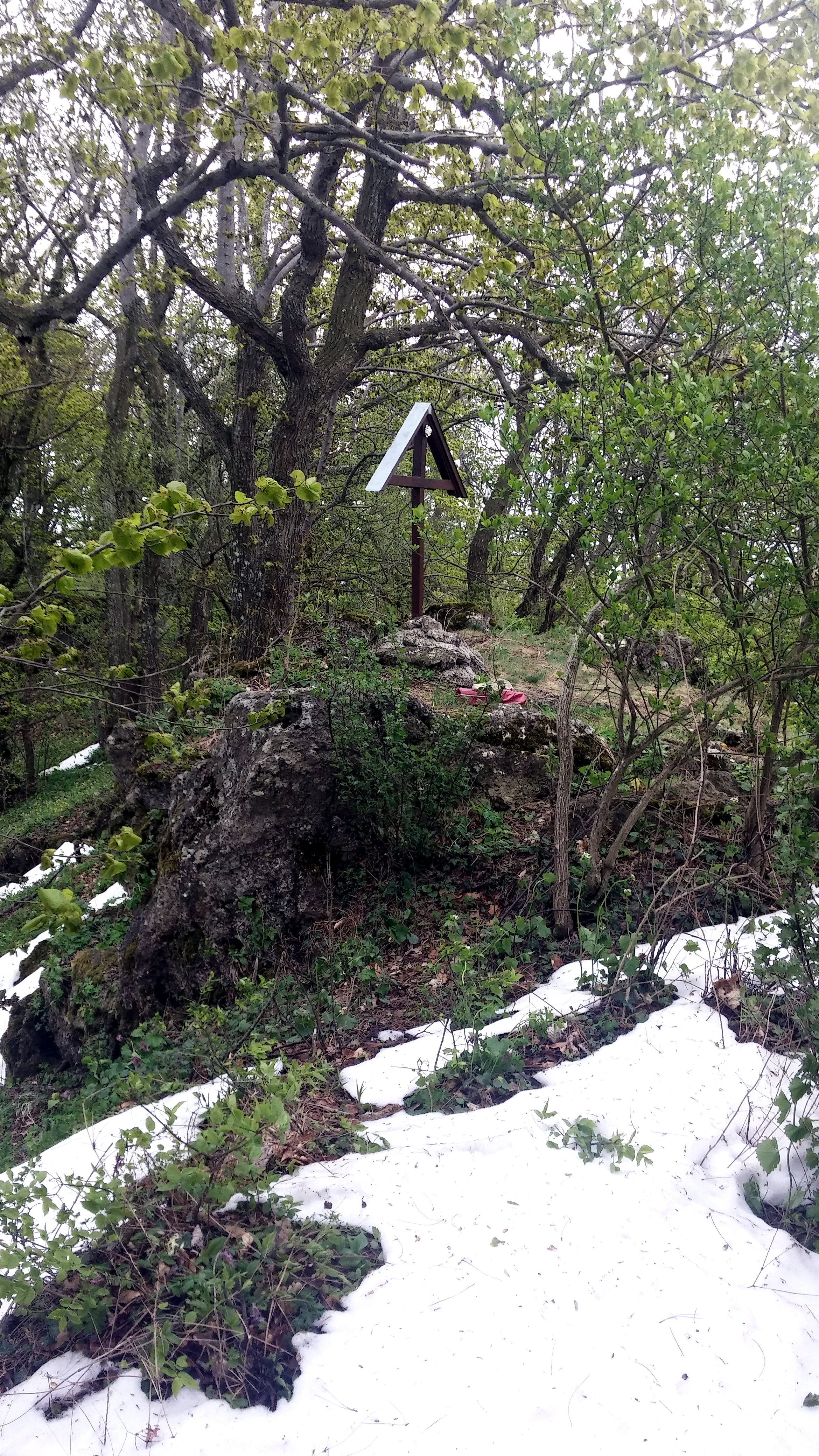 Gipfelkreuz des Parapluieberges in Perchtoldsdorf, Niederösterreich am 24. April 2017 mit Schneeresten der schweren Schneefälle in der Woche davor